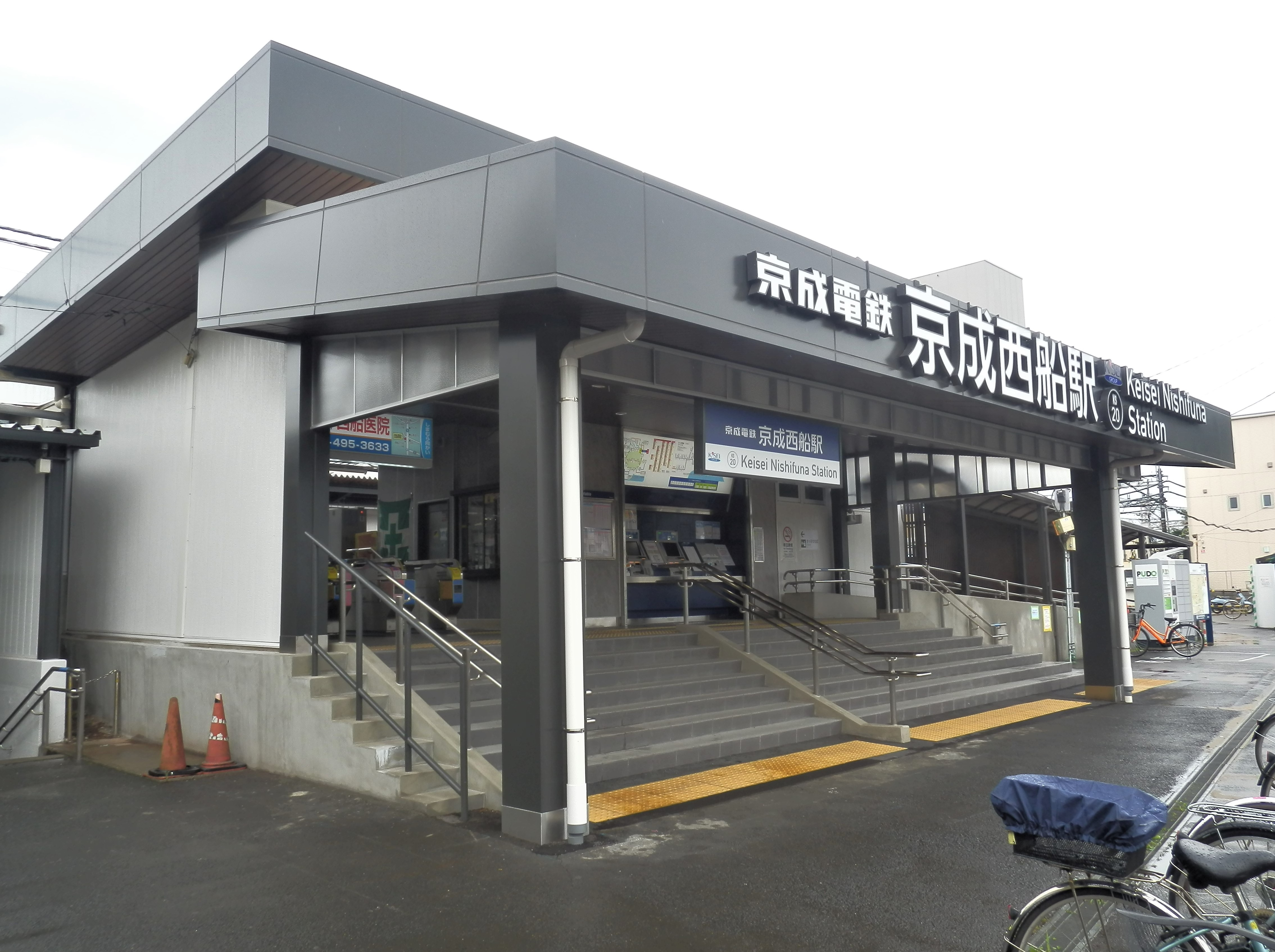 京成西船駅駅舎（リニューアル後）